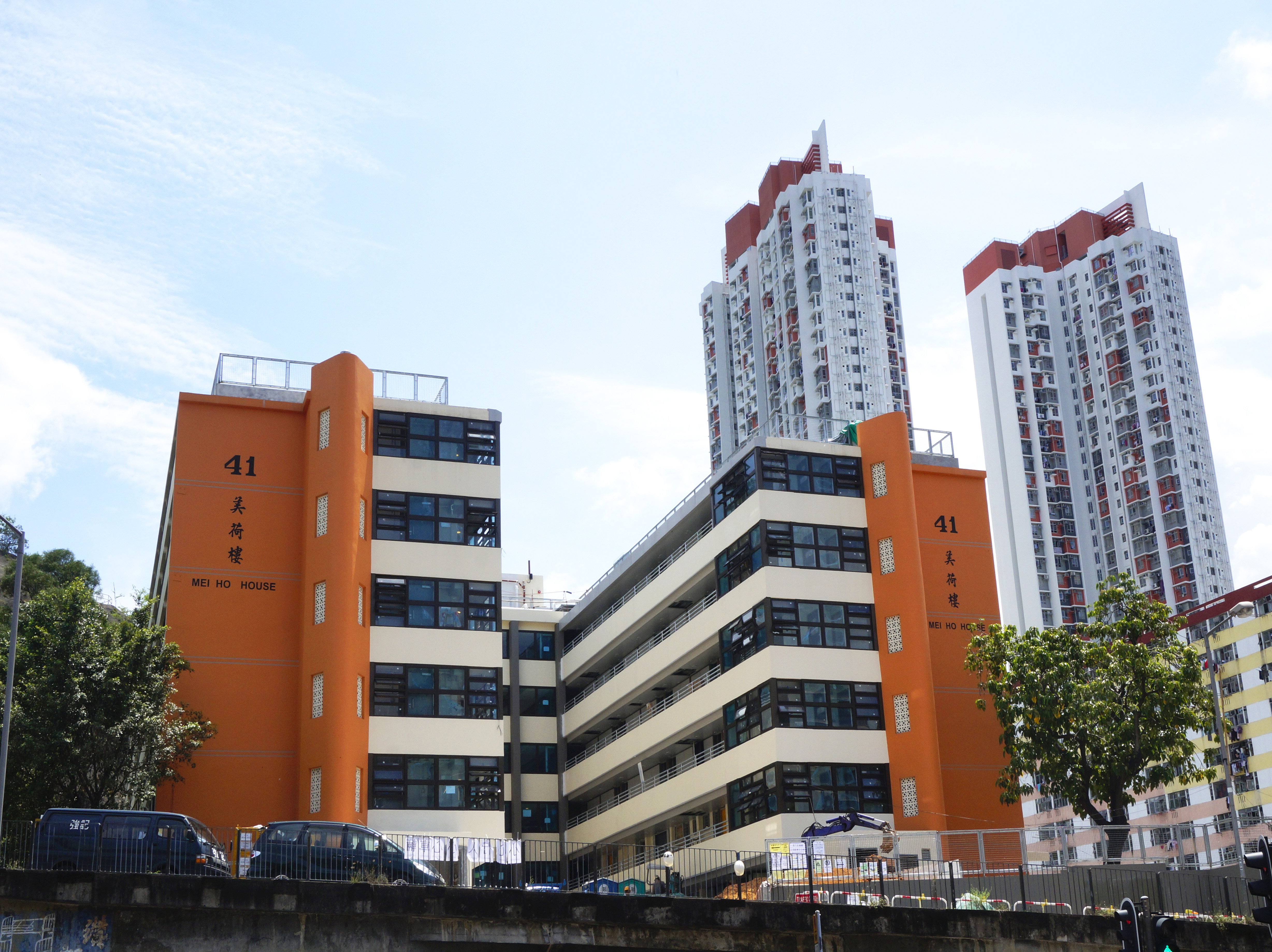 石硤尾邨美荷樓